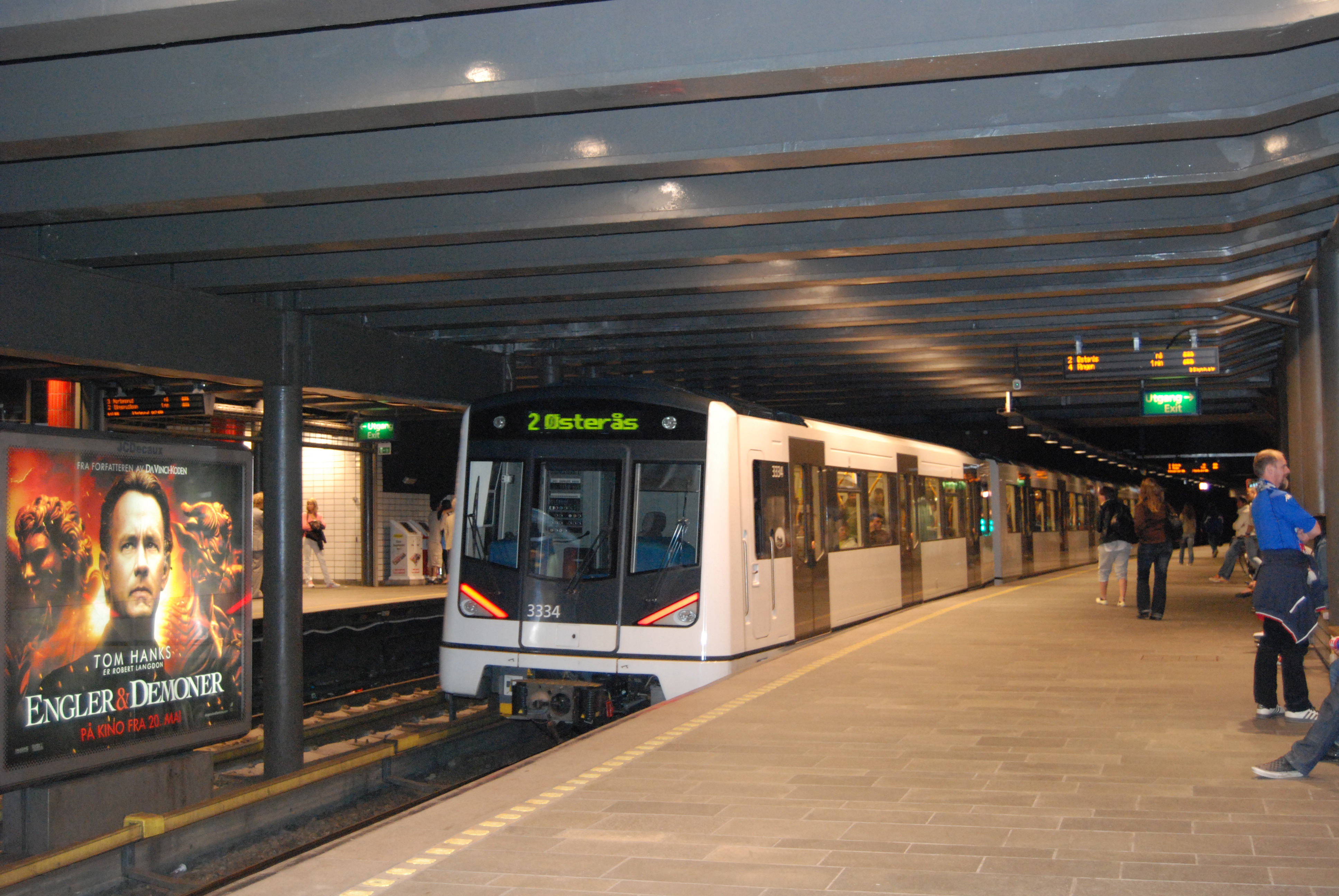 Stacja T-bane Nationaltheatret (oslo) 25. 05. 2009 r.